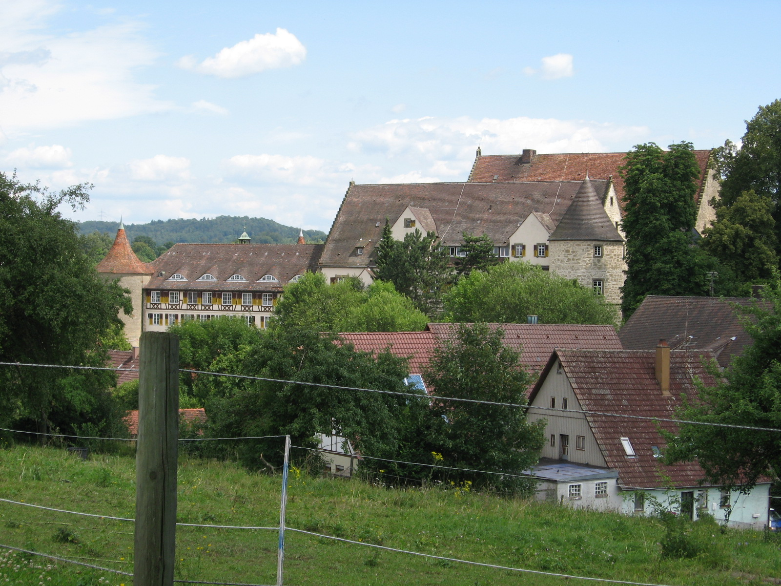 Schloss Obersontheim von Westen gesehen, mit (v.l.n.r.) Nordturm, Anbau aus dem 20. Jahrhundert, Friedrichsbau, hinter ihm der größere Erasmusbau und Westturm